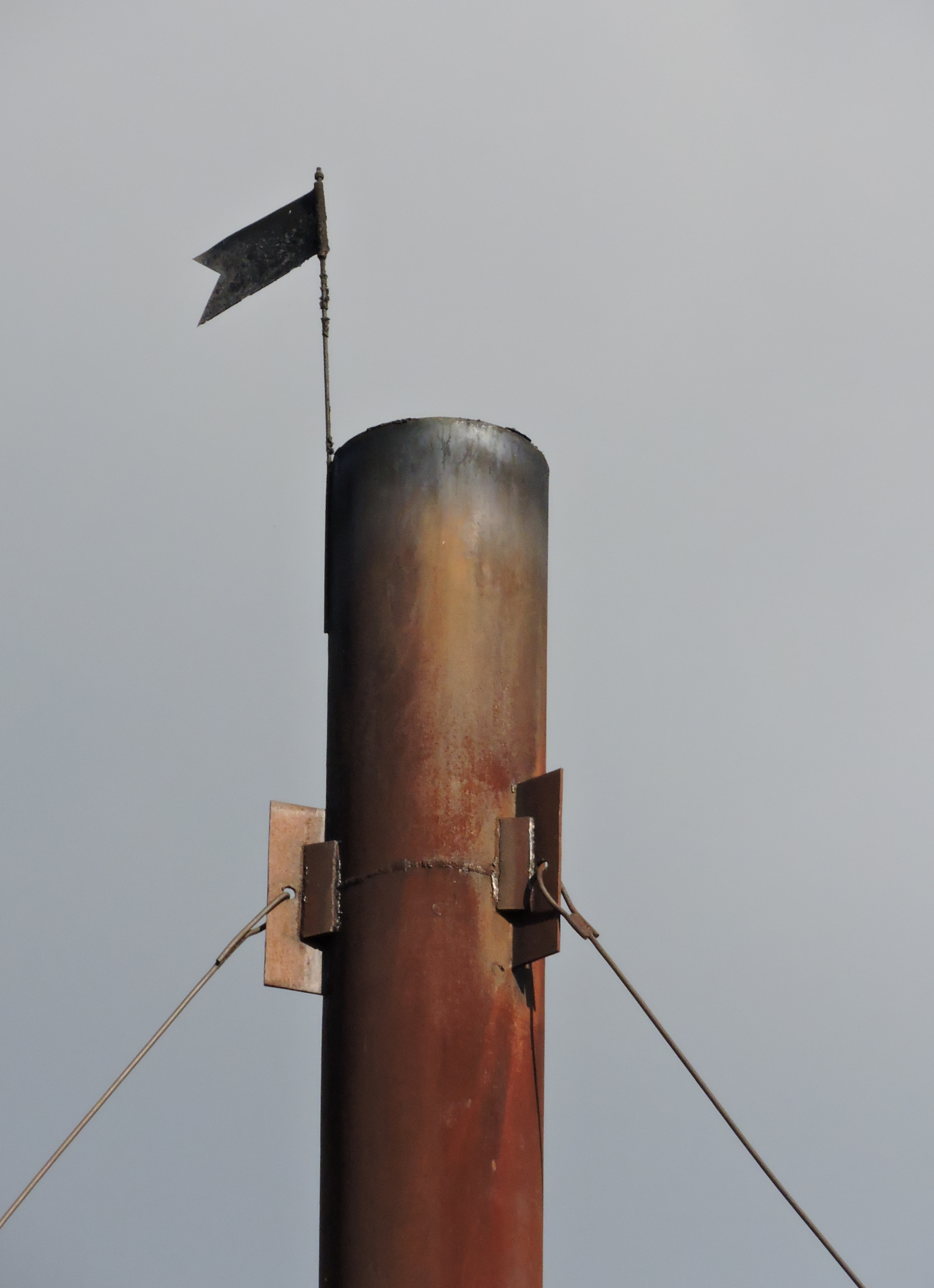 Верхушка дымовой трубы, увенчанная флюгером